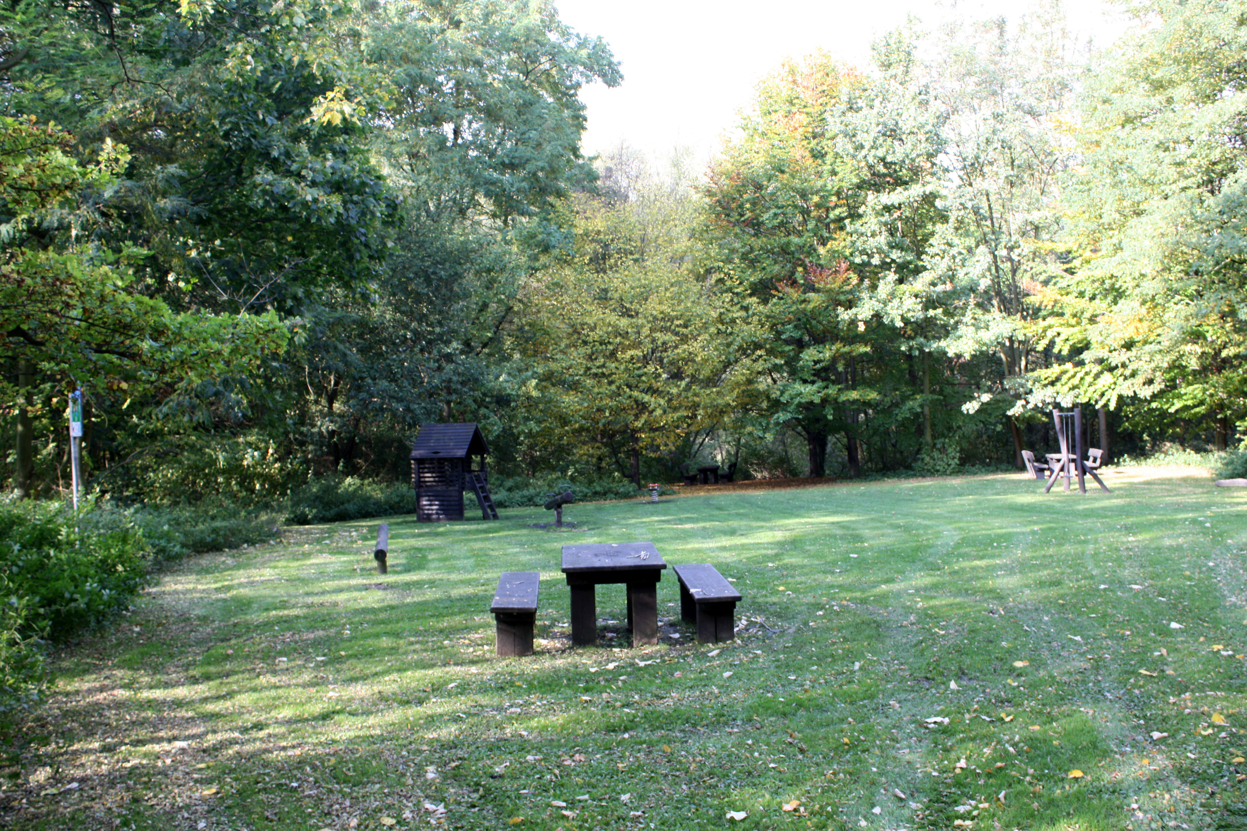 Alt-Hürth, Spielplatz oberhalb des Adolf-Dasbach-Weihers